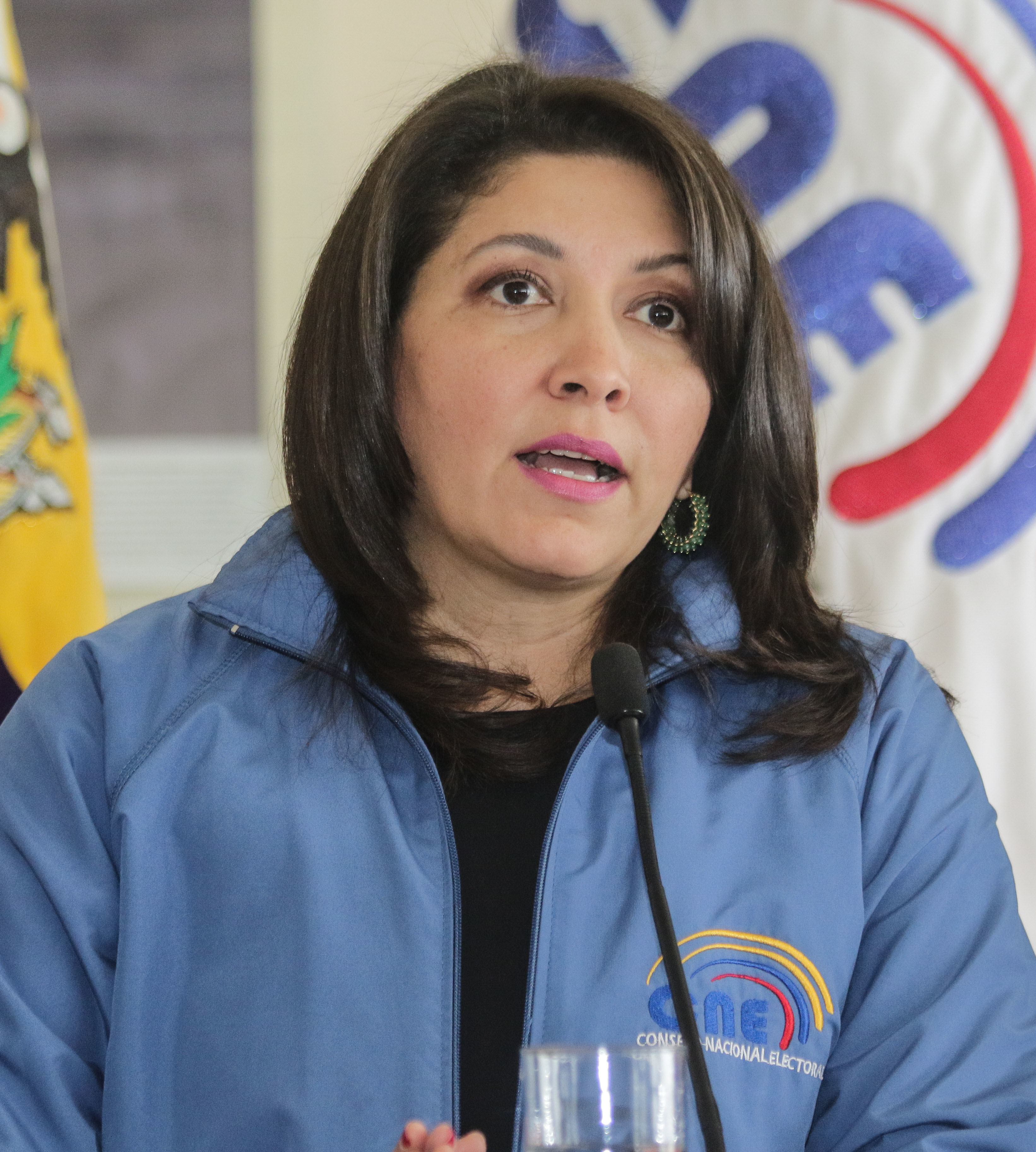 Quito 8 Ene (ANDES).- En el Instituto Geográfico Militar en Quito se realiza la producción y control de la emisión de papeletas y planchas de votación. La presidenta del CNE Nubia Villacís recorrió las instalaciones. Fotografías: Carlos Rodríguez/Andes.